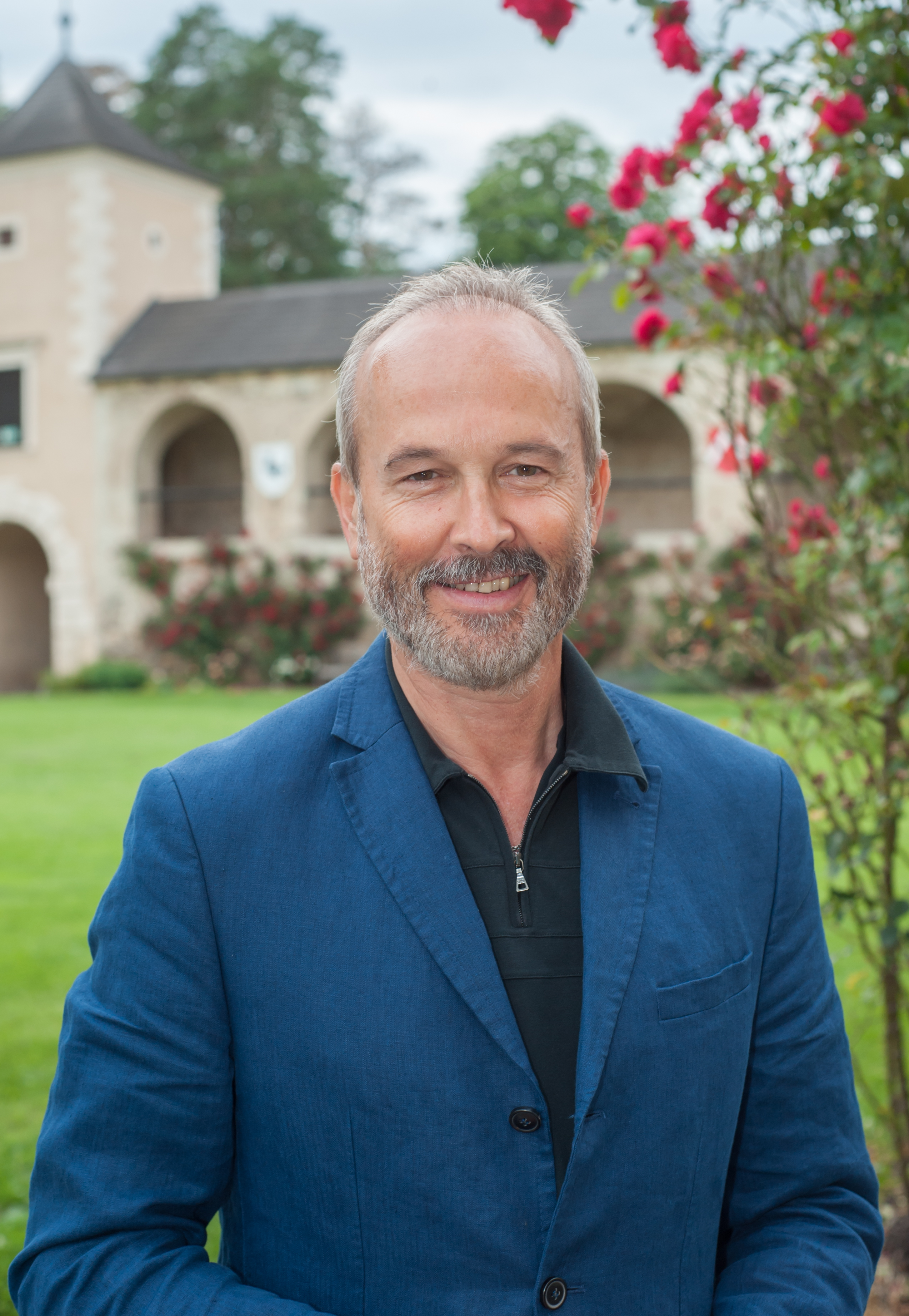 Sommernachtskomödie Rosenburg 2016, Premiere von Kalender Girls am 30. Juni 2016. Bild zeigt Erwin Wurm.